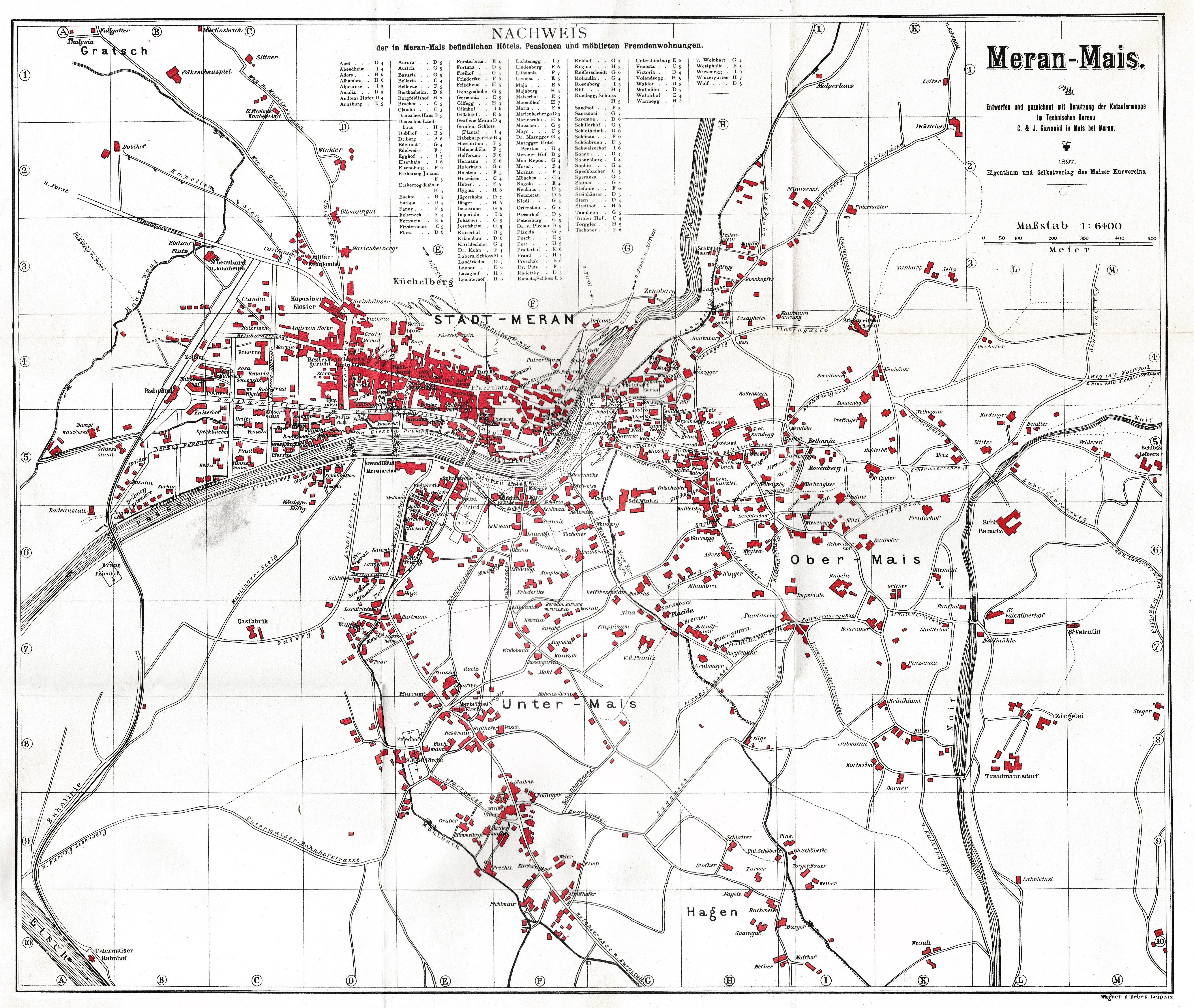 Karte von Meran-Mais 1897